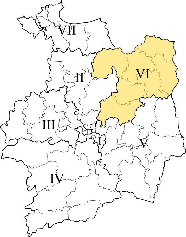 Carte de la sixième circonscription d'Ille-et-Vilaine